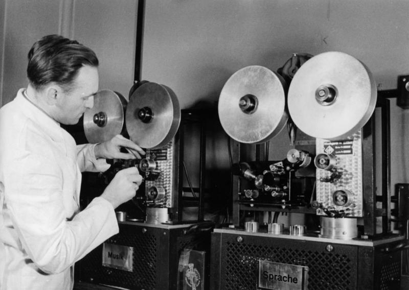 Deutsche Wochenschau, Mischraum Die Deutsche Wochenschau entsteht. Im Mischraum der Redaktion der Deutschen Wochenschau. Die Mischbänder mit Sprache, Musik und Geräusch, die von dem Tonmeister zu einem einheitlichen vorführungsfertigen Band zusammengemischt werden, laufen hier noch getrennt - aber "synchron" durch das Mischgerät. Ihr Ton ist als fertige Mischung in der Tonbox zu hören.